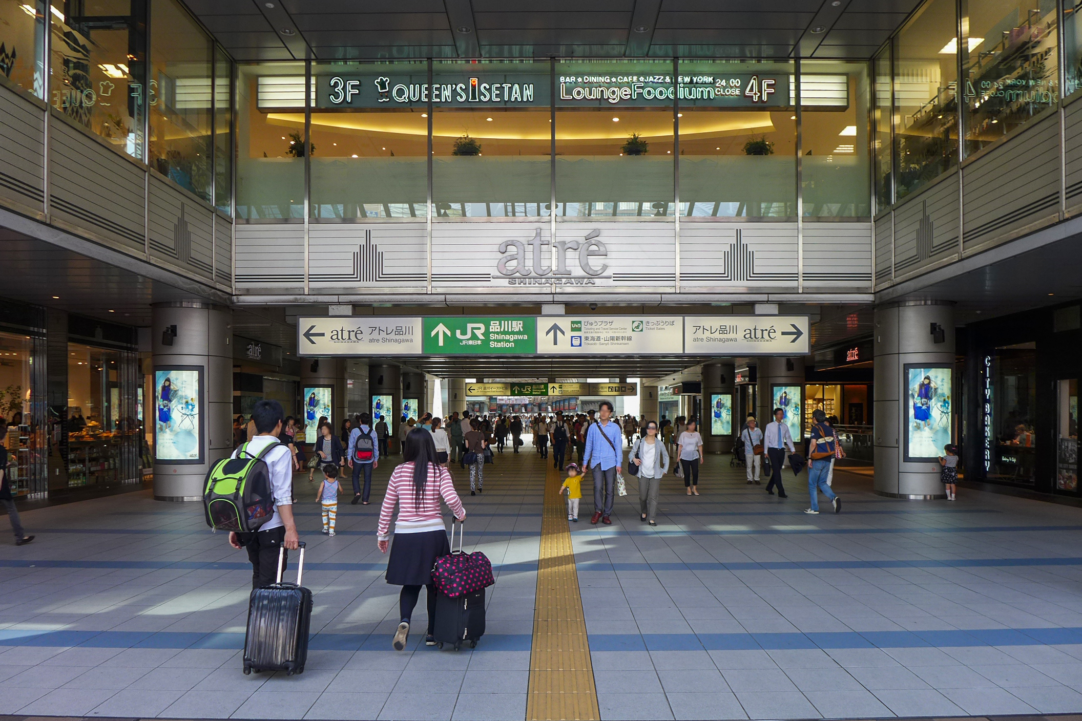 Atre shinagawa